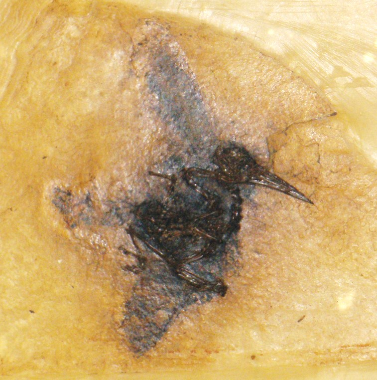 Fossil of Messelirrisor, an extinct bird- Took the photo at Senckenberg Museum of Frankfurt